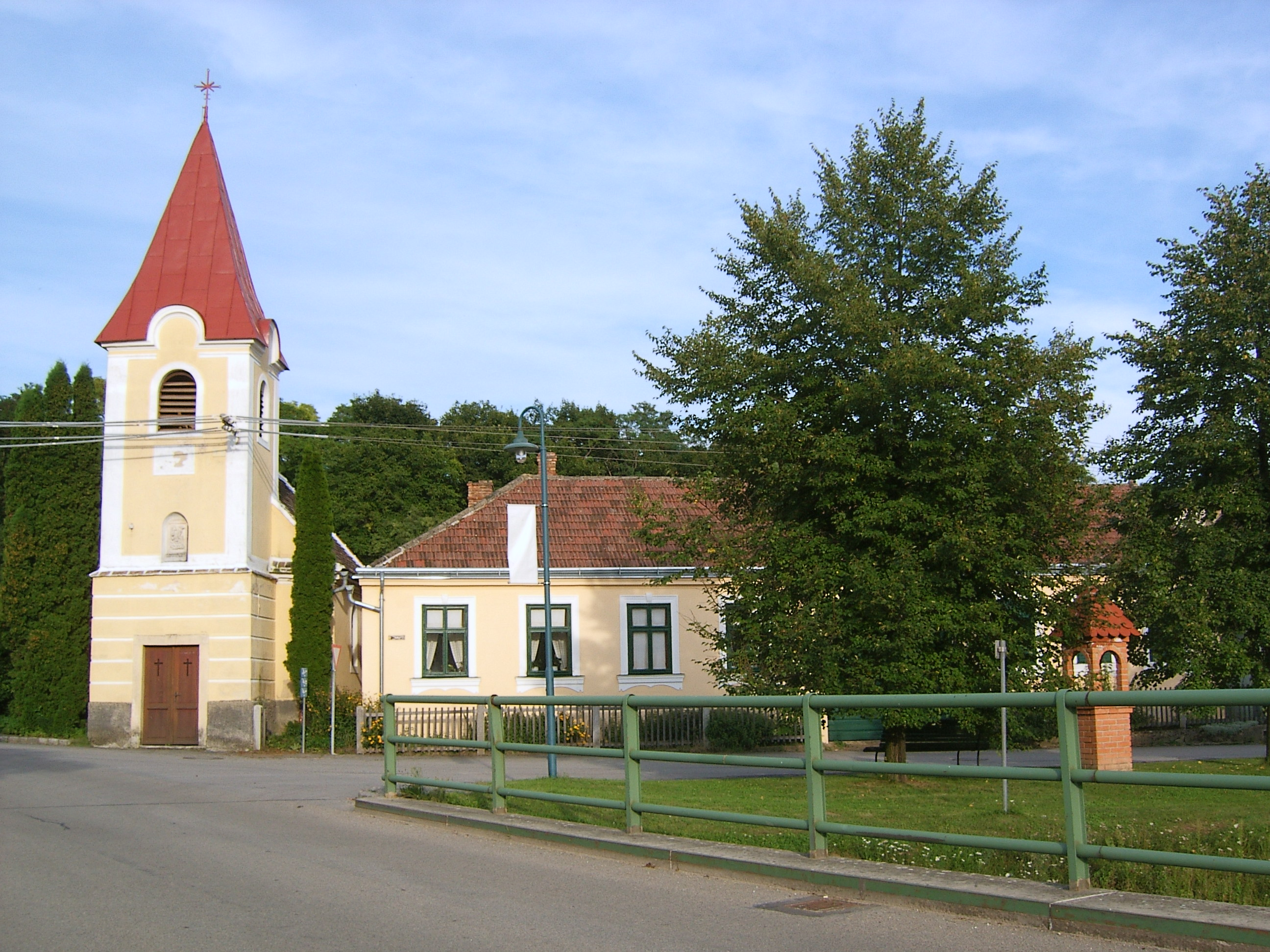 Ortskapelle Parisdorf, Gemeinde Ravelsbach